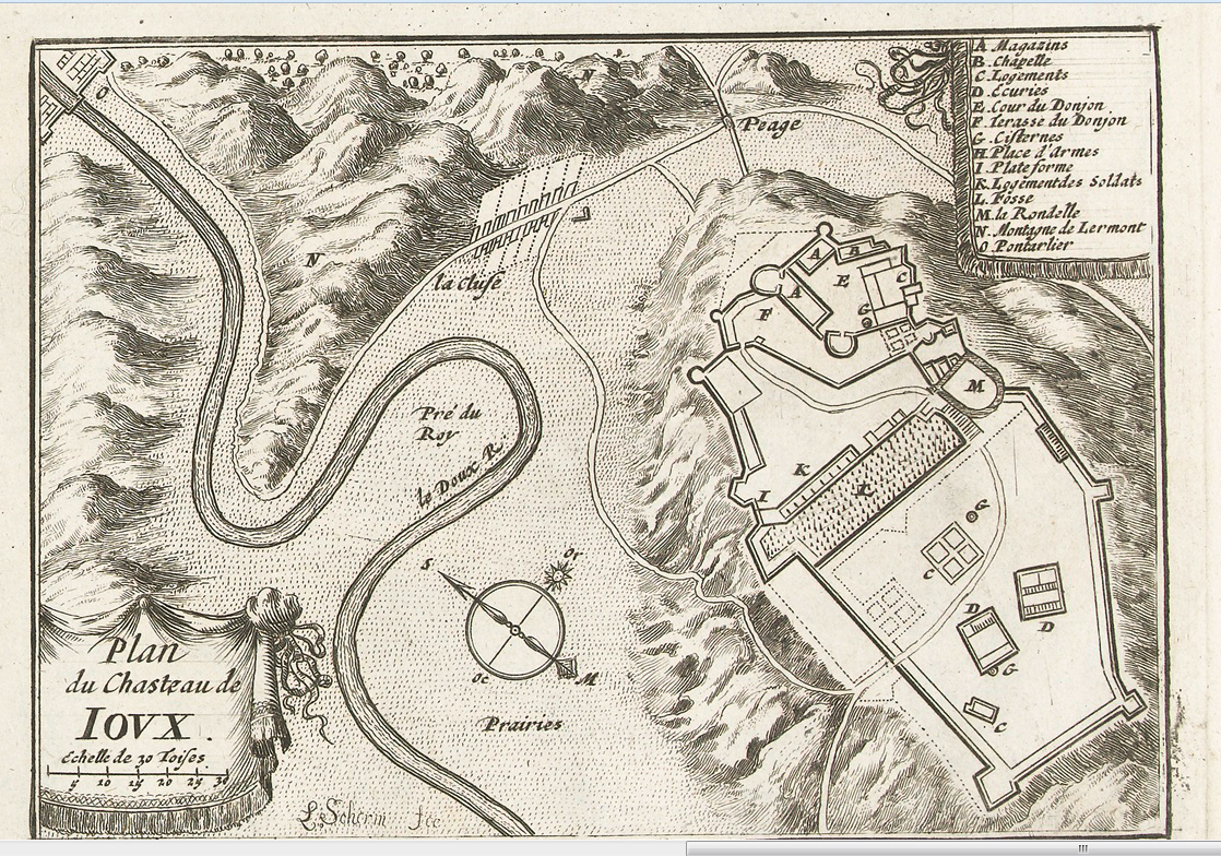 Copie faite en 1702 d'un plan du château de Joux avant 1678